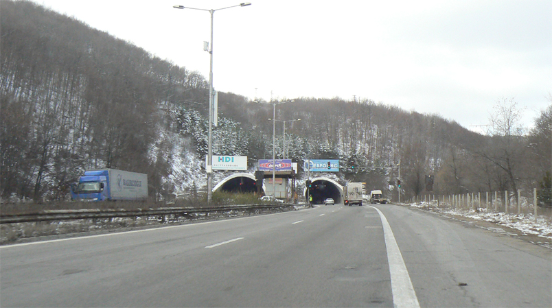 Тунелът "Траянови врата" по магистрала "Тракия" край Костенец. Крепостта Траянови врата се намира на хълма вдясно от тунела. Tunnel "Trayanovi vrata" (Trayan gates) on Trakia highway, near Kostenetz, Bulgaria. The fortress Trayanovi vrata is placed on a hill right to the tunnel.